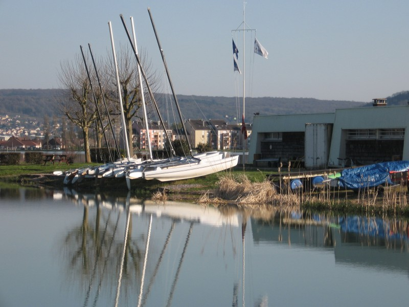 Lac de Vaivre